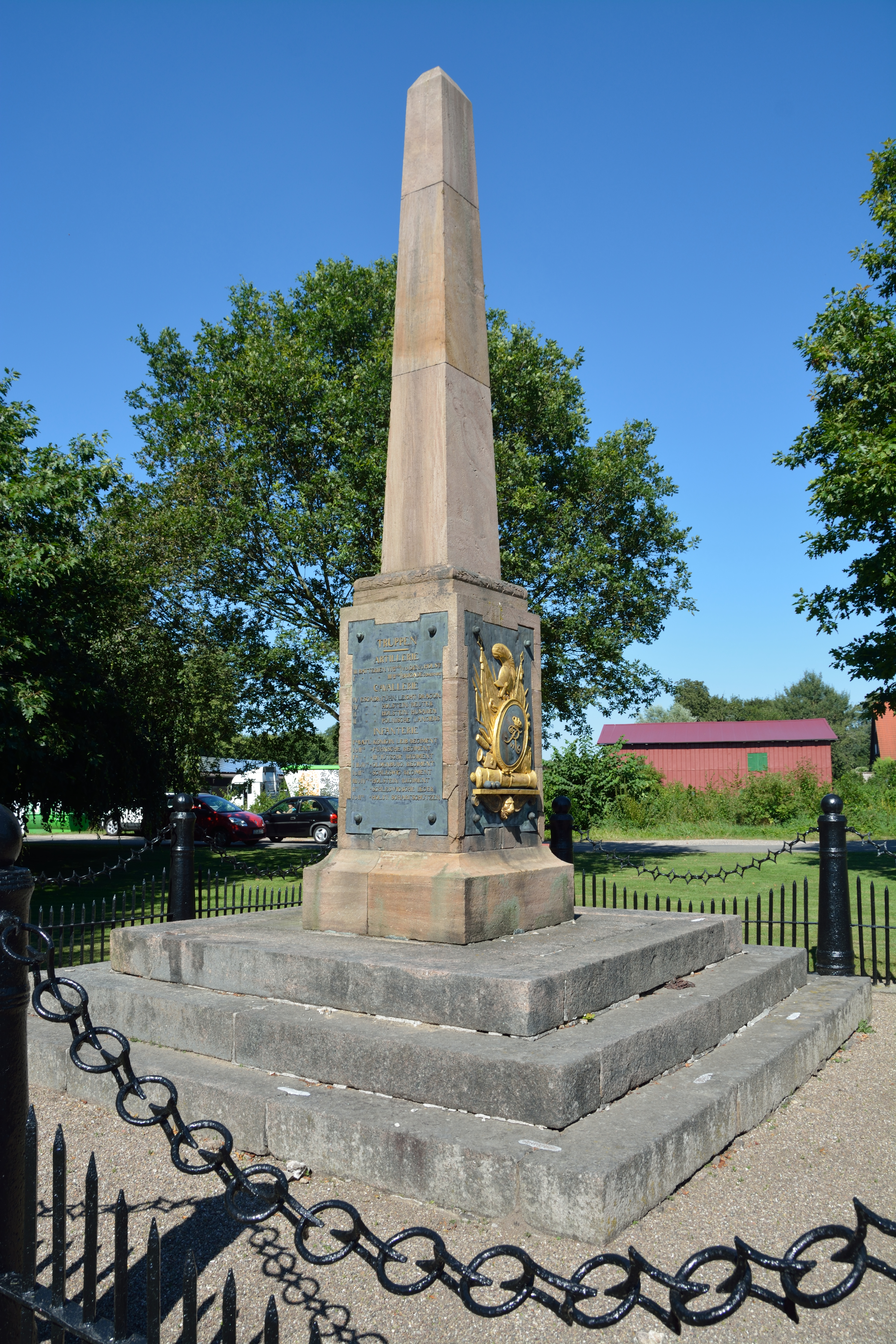 Denkmal für das Gefecht in Sehestedt